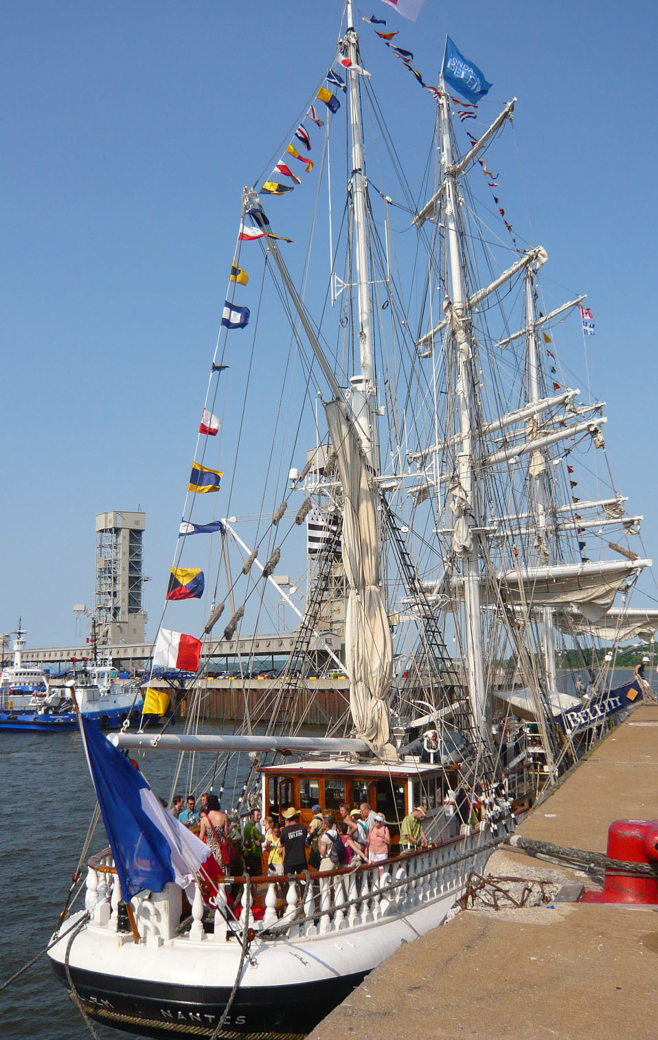 Le Belem amarré au Vieux-Port de Québec, en juillet 2008, pour le 400e anniversaire de Québec.